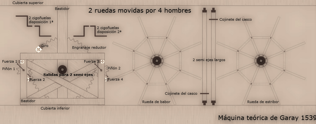 Máquina teórica completa del memorial 1539